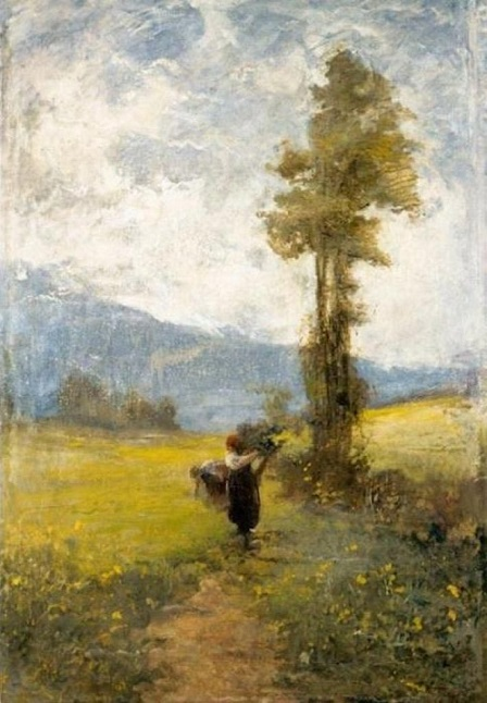 "Paesaggio", olio su tela, 71 x 102 cm.